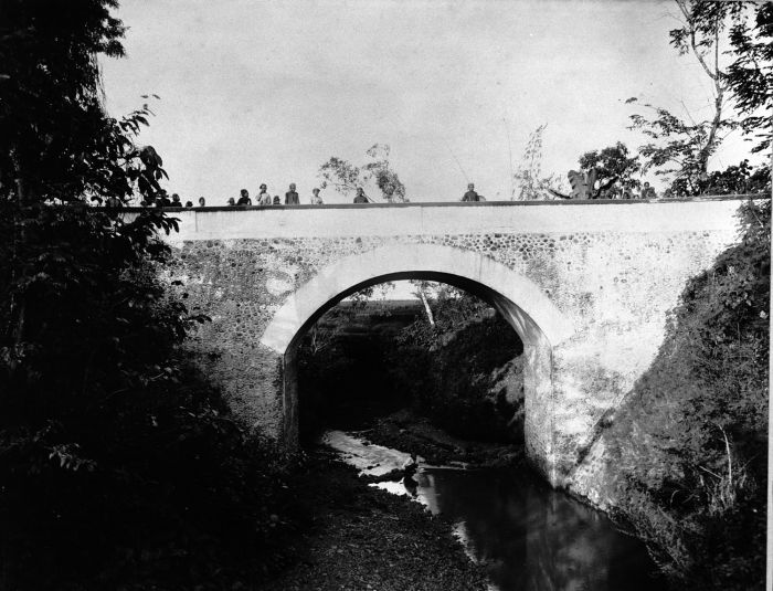 Foto. De brug over de Sograrivier.